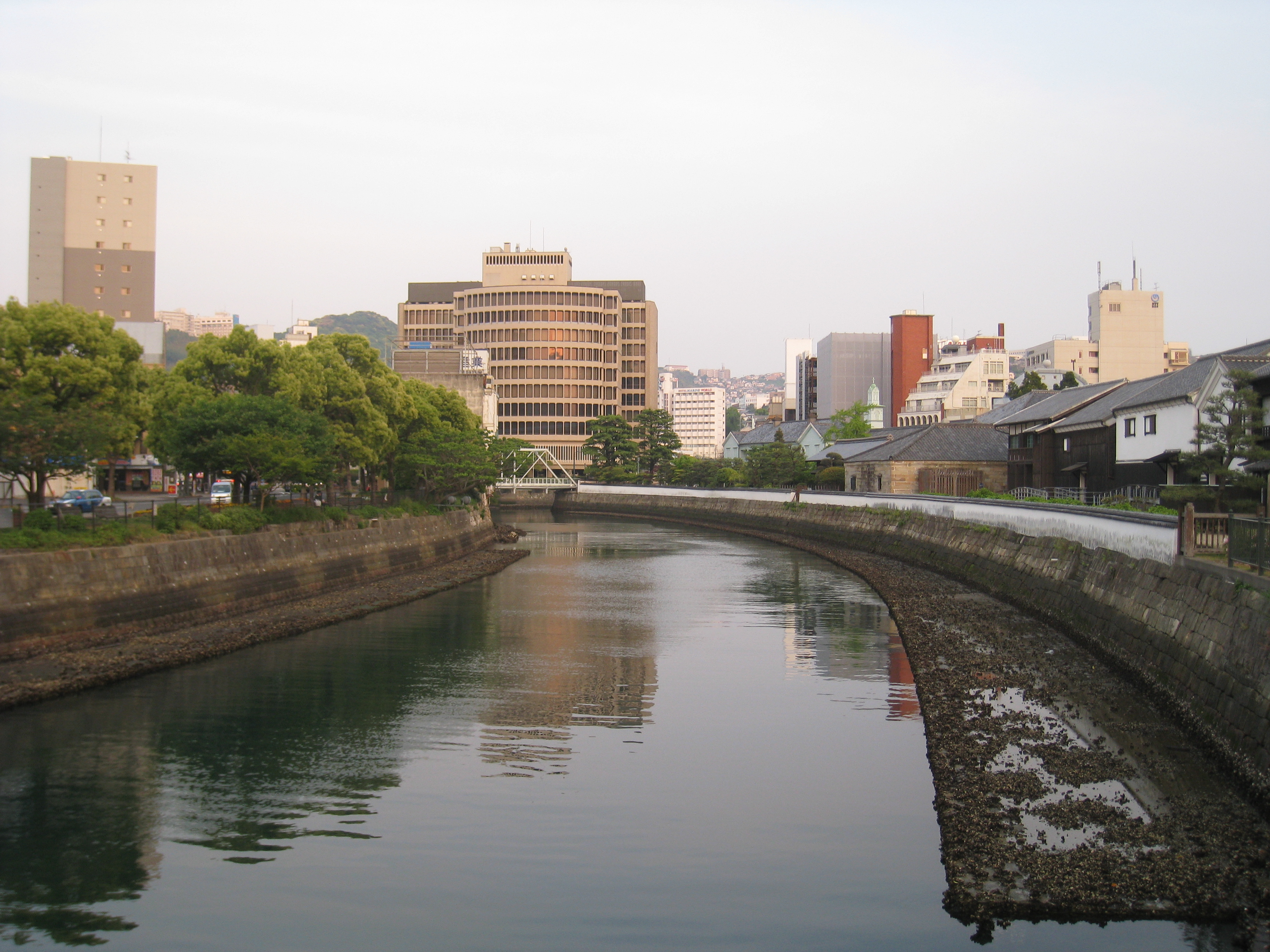 長崎市中島川玉江橋より